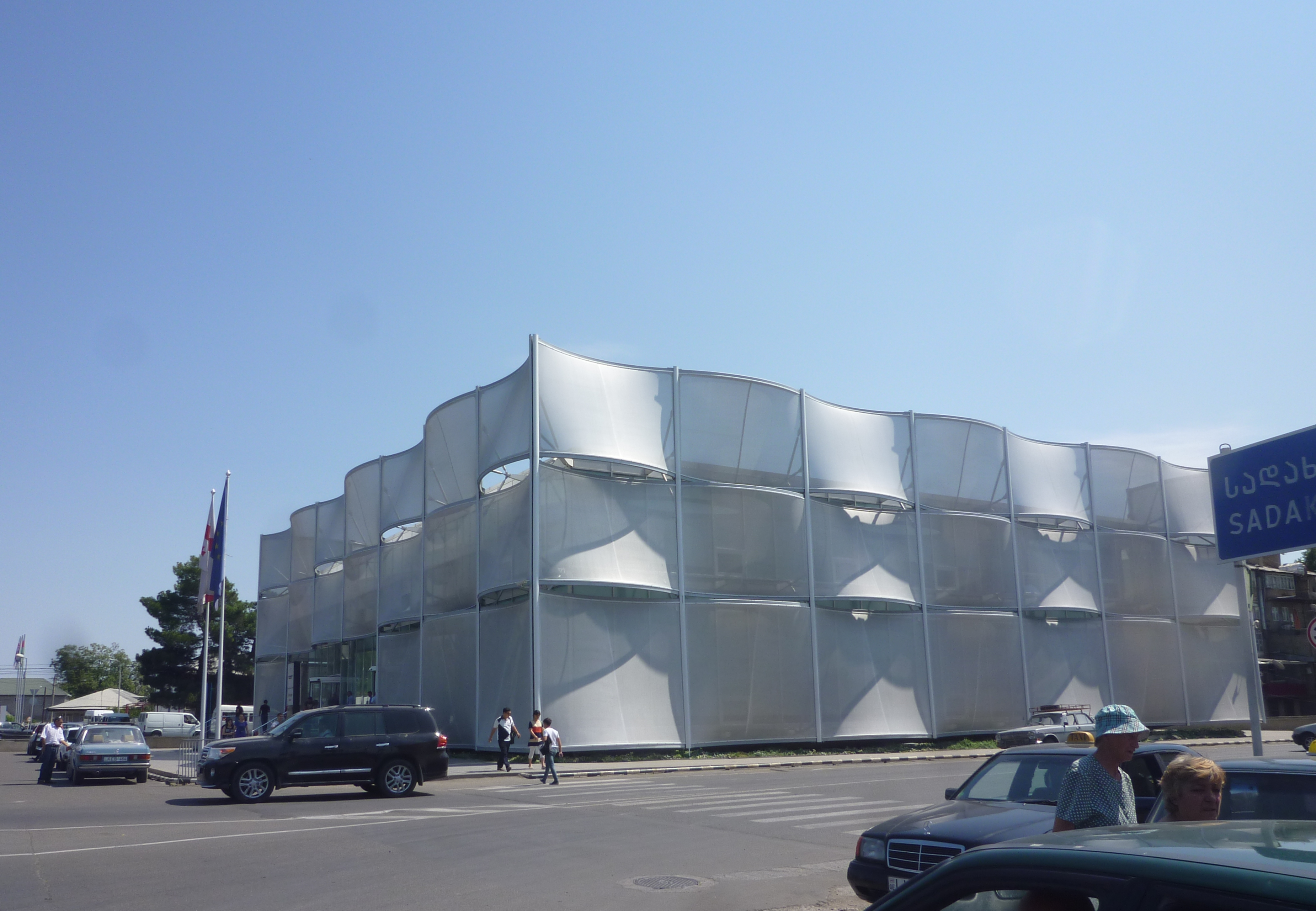 მარნეული, იუსტიციის სახლი